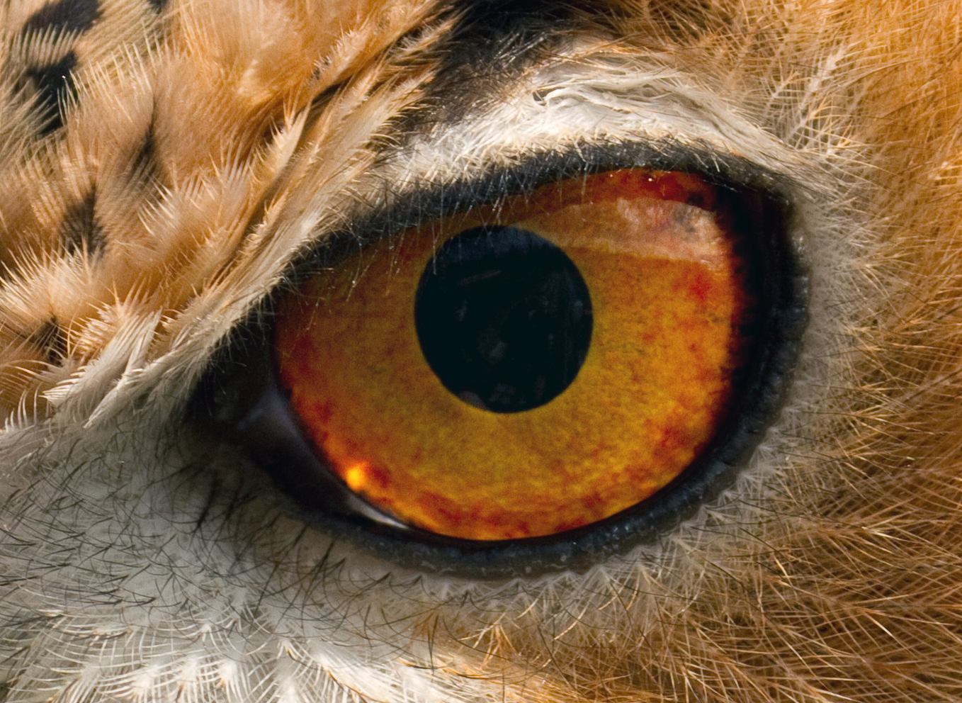 Orange eye